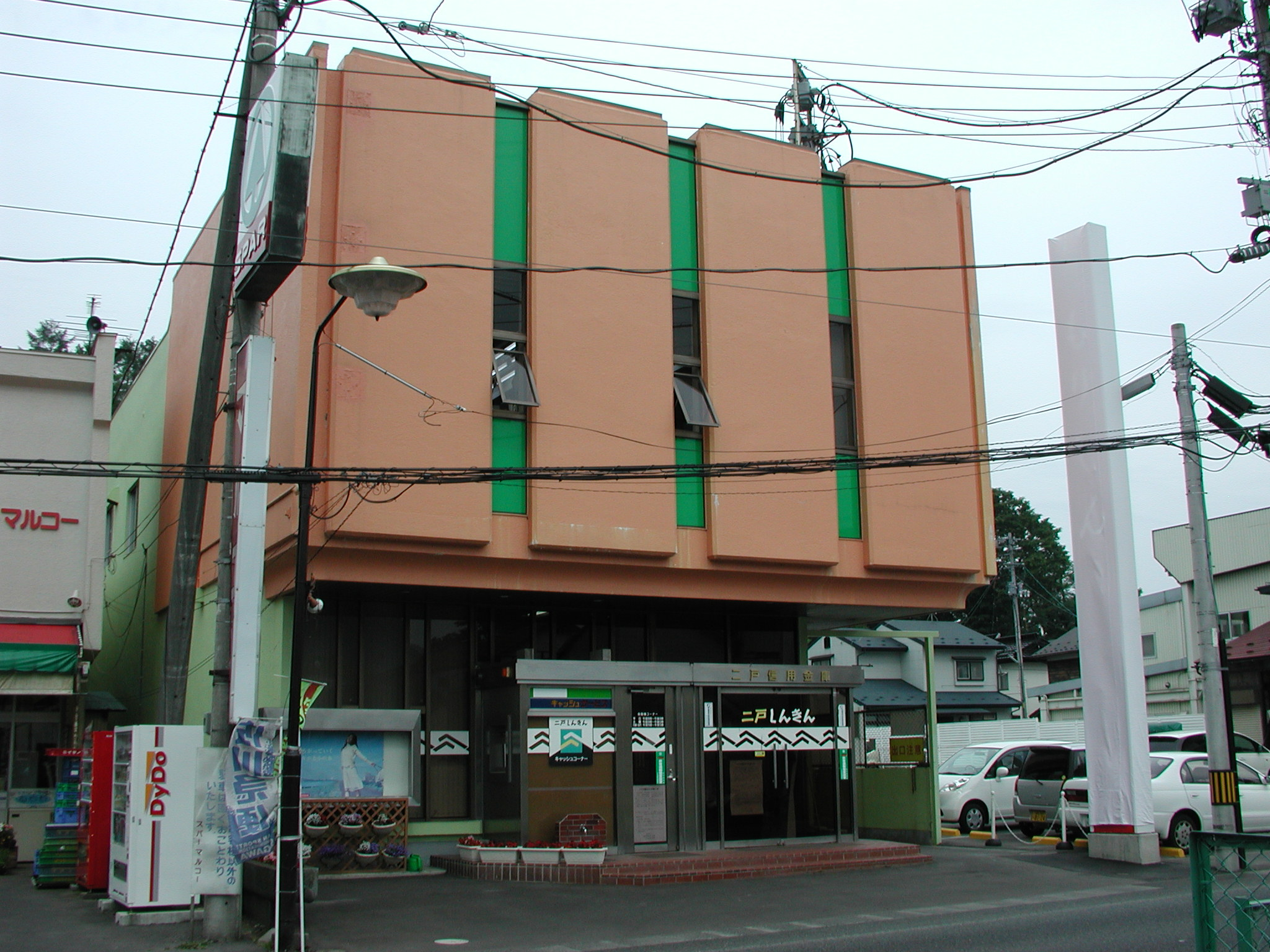 2008年7月7日の盛岡信用金庫との合併を目前に控えた、二戸信用金庫 本店（店番：001）。 合併後は『盛岡信用金庫 二戸支店』に改称された。